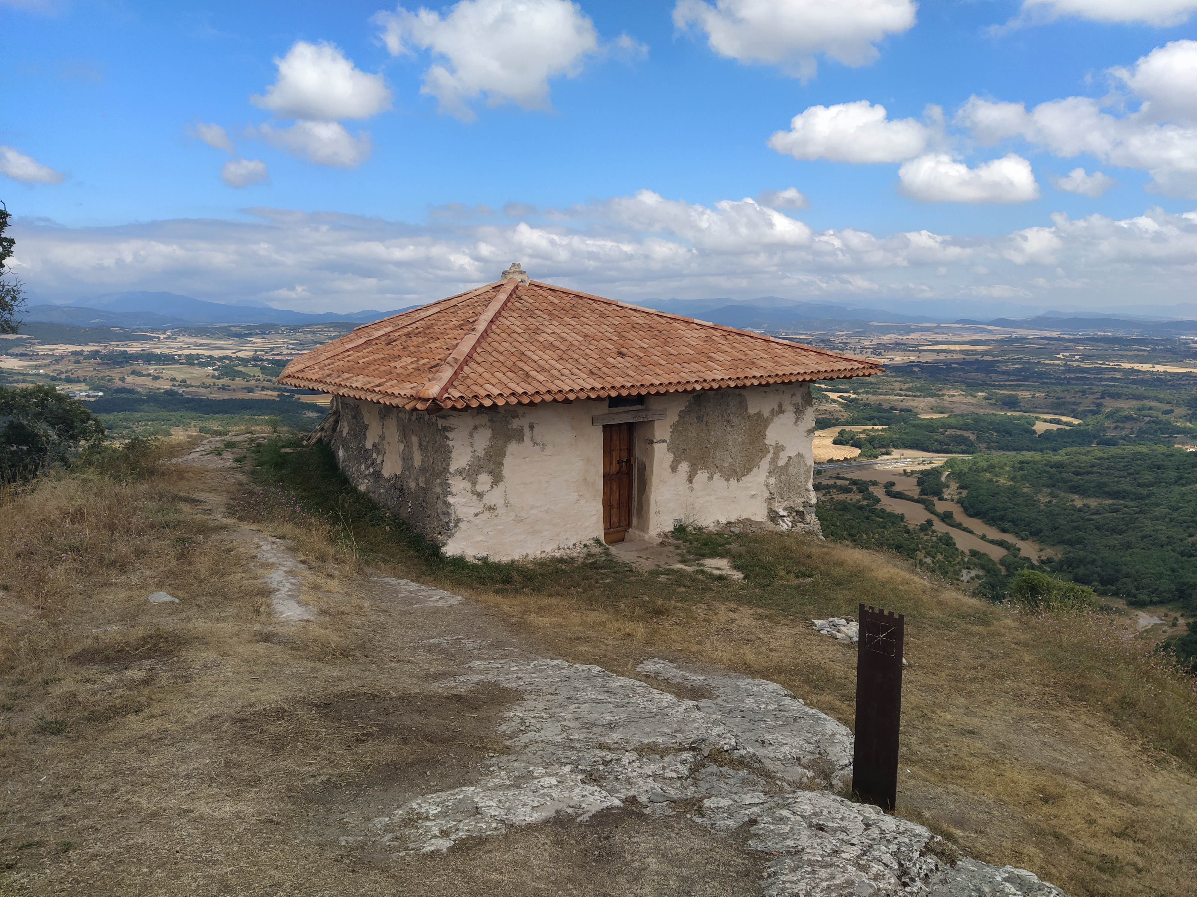 Ermita de San Bitor en el emplazamiento del antiguo castillo-tenencia de Záitegi. JULIO 2020